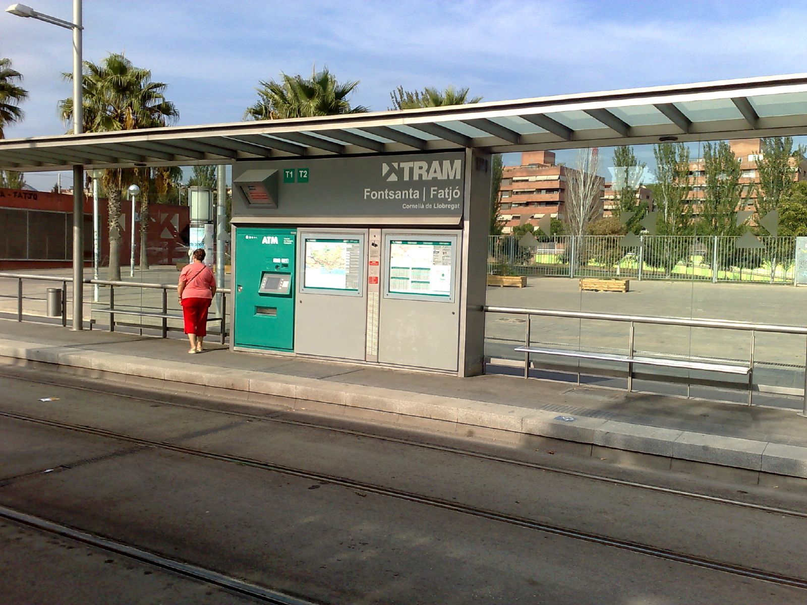 Estació de tramvia de Fontsanta|Fatjó, a Cornellà de Llobregat